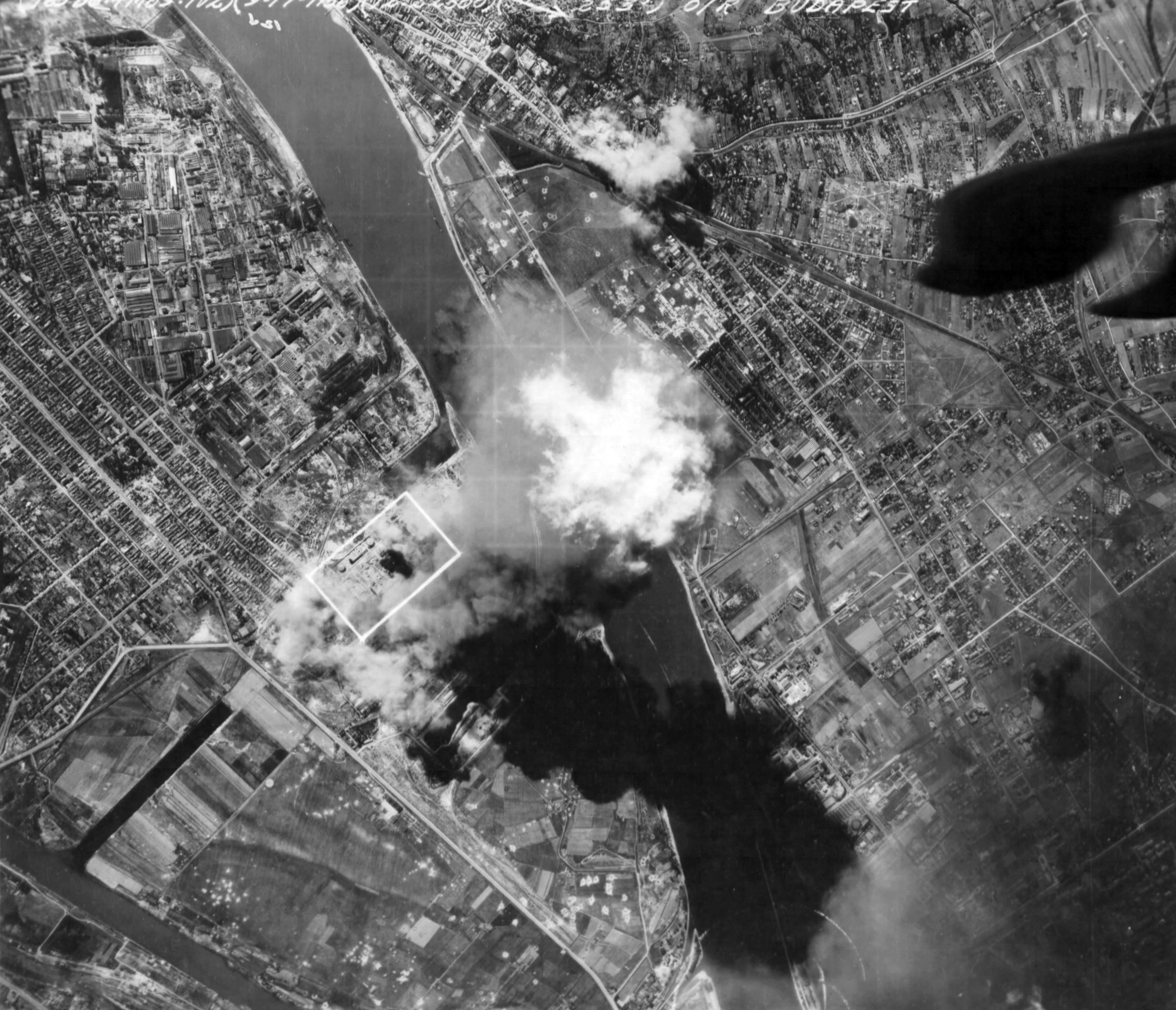 a Csepeli szabadkikötő bombázása. Location: Hungary, Budapest Tags: second World War, bombing, aerial photo Title: a Csepeli szabadkikötő bombázása.